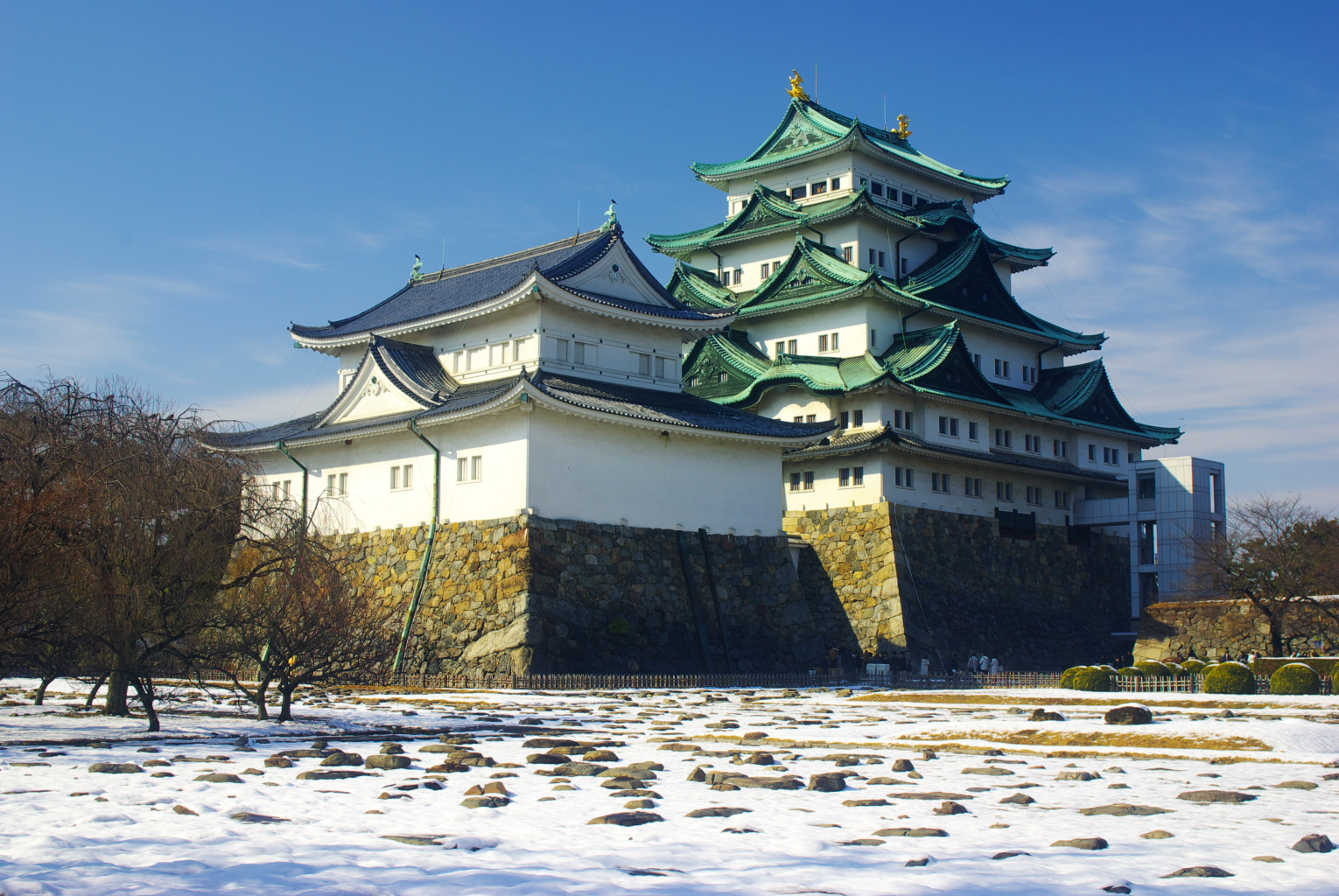 雪が積もる名古屋城本丸御殿跡と天守